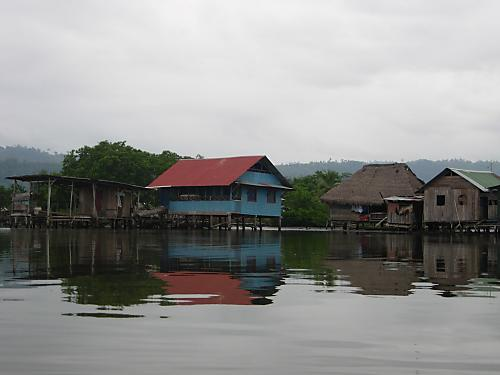 ein Haus in den Bocas del Toro